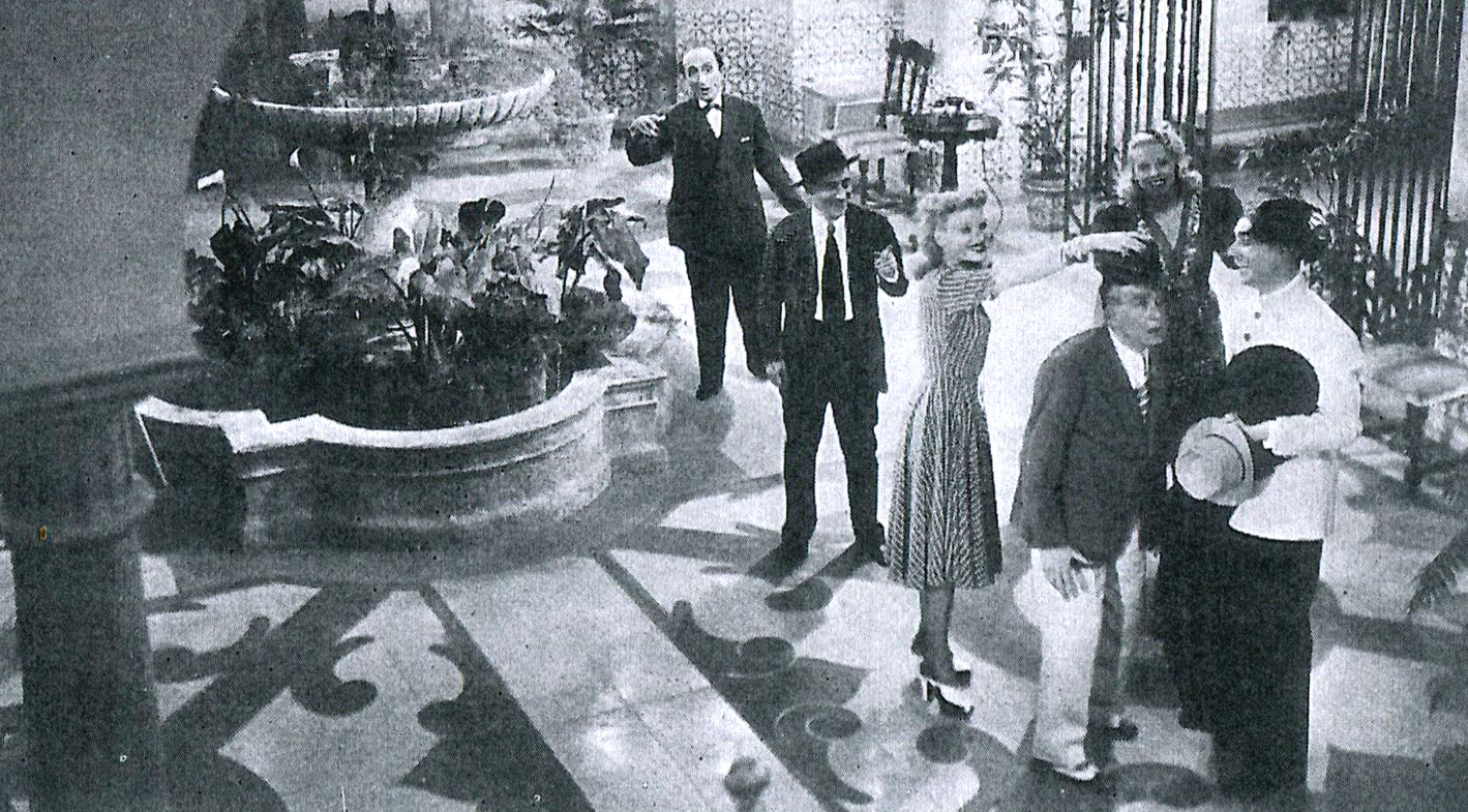 Foto scena di "Alessandro sei grande!" (Bragaglia, 1940) con al centro Vivi Gioi